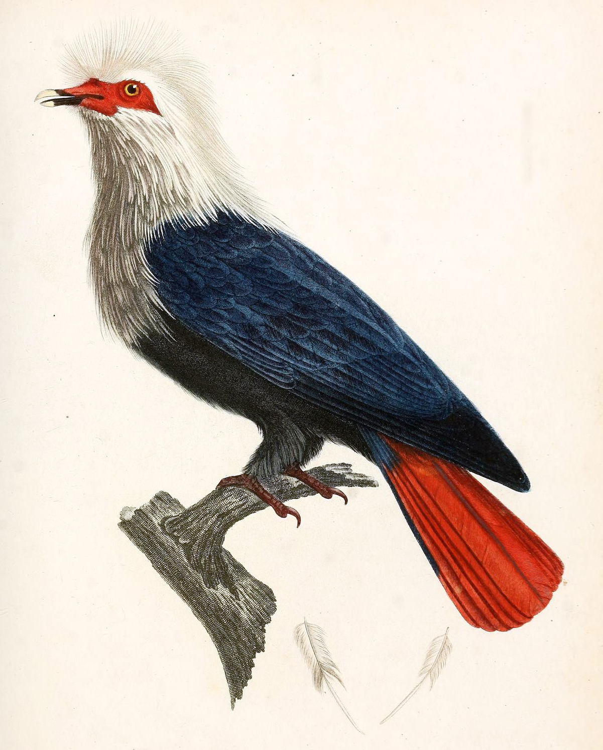 Mauritius Blue Pigeon from François Levaillant (1753–1824) Histoire Naturelle des Oiseaux d'Afrique.